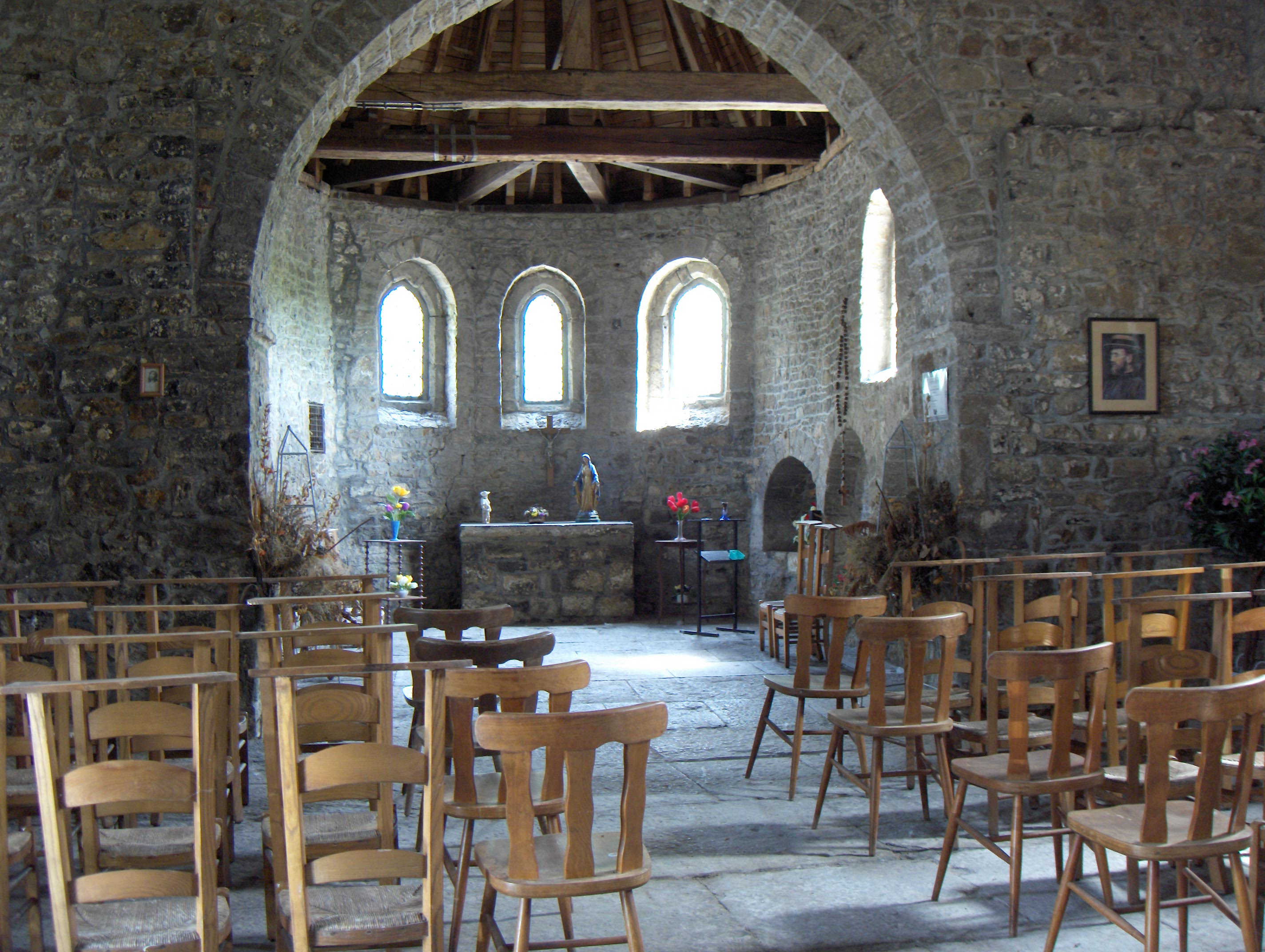 Chièvres (Belgien, Prov. Hennegau), Chapelle de la Ladrerie (12. Jh.).